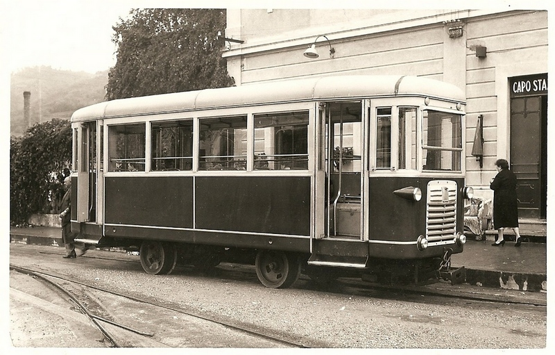 La vettura 11 (in alluminio) della Guidovia della Madonna della Guardia (Genova)